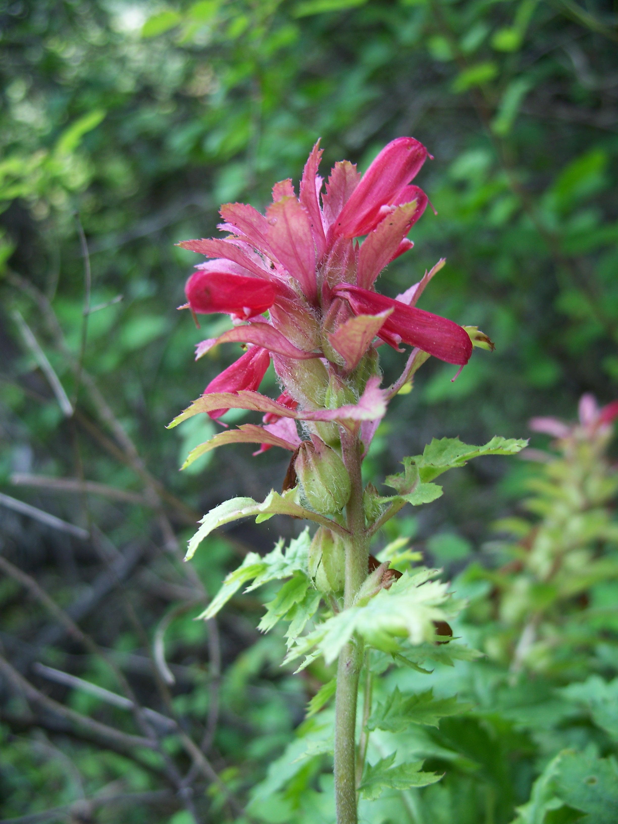 Pedicularis densiflora Made in Saratoga, California. Identified by Franz Xaver.